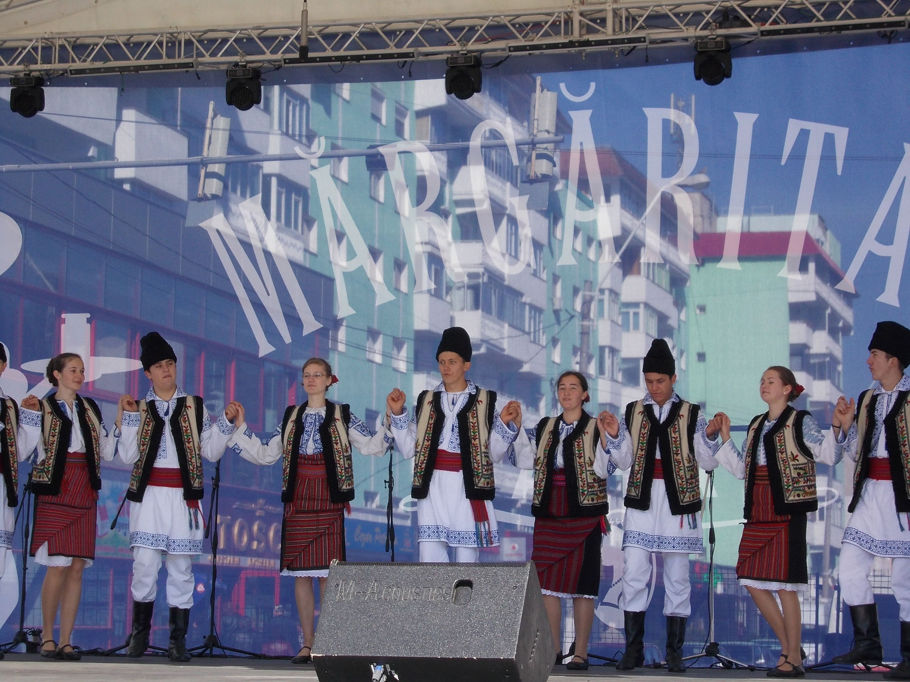 Ansamblul de muzică populară Izvoraşul din Săbăoani, Neamţ Port popular moldovenesc